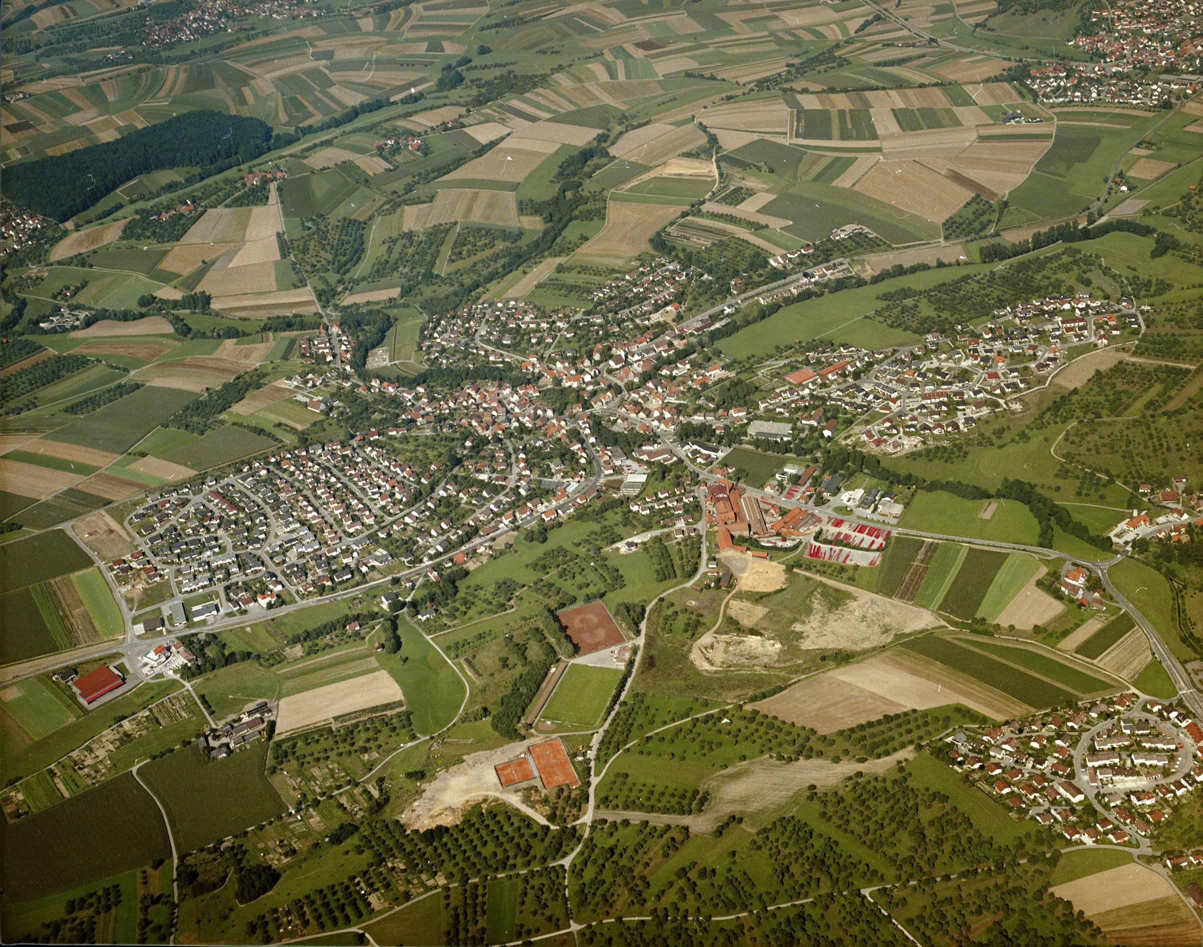 Luftbild von Unterweissach - Staatsarchiv Sigmaringen - Archivalieneinheit N 1/96 T 1 Nr. 323